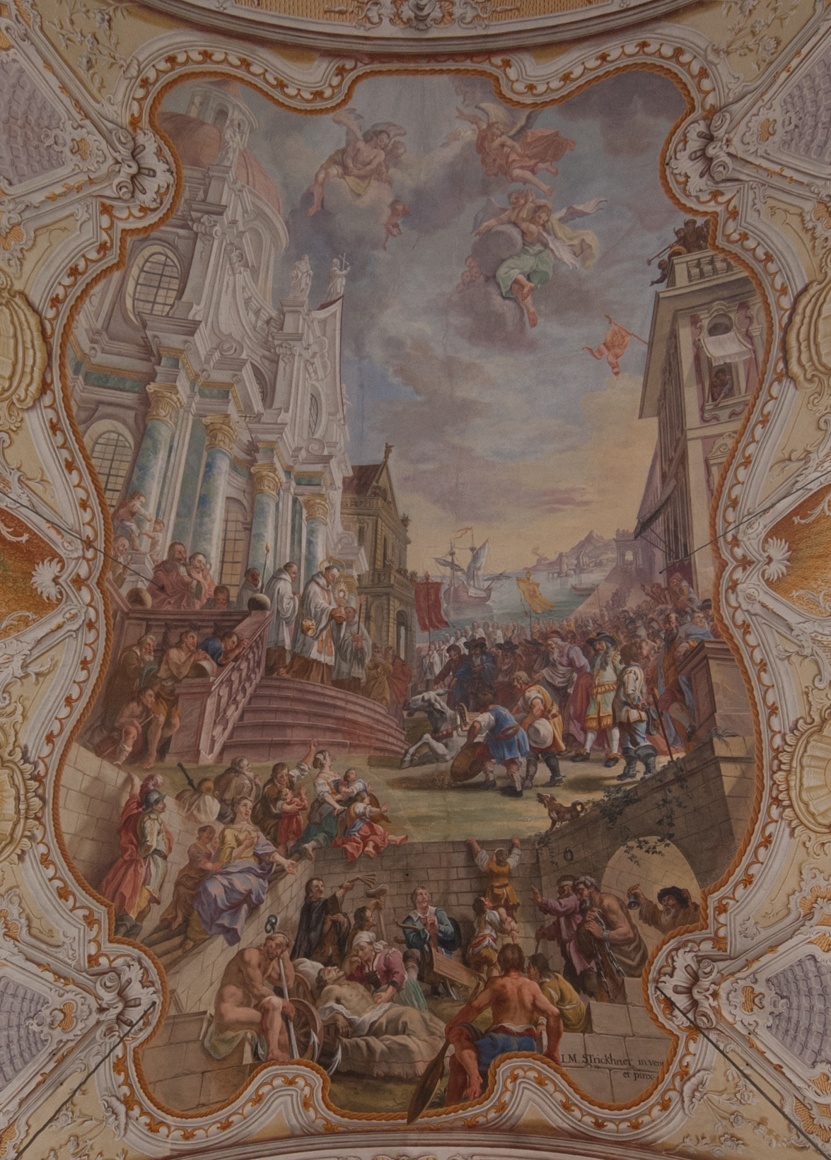 Wiki takes Nordtiroler Oberland: Wallfahrtskirche hl. Antonius von Padua Rietz